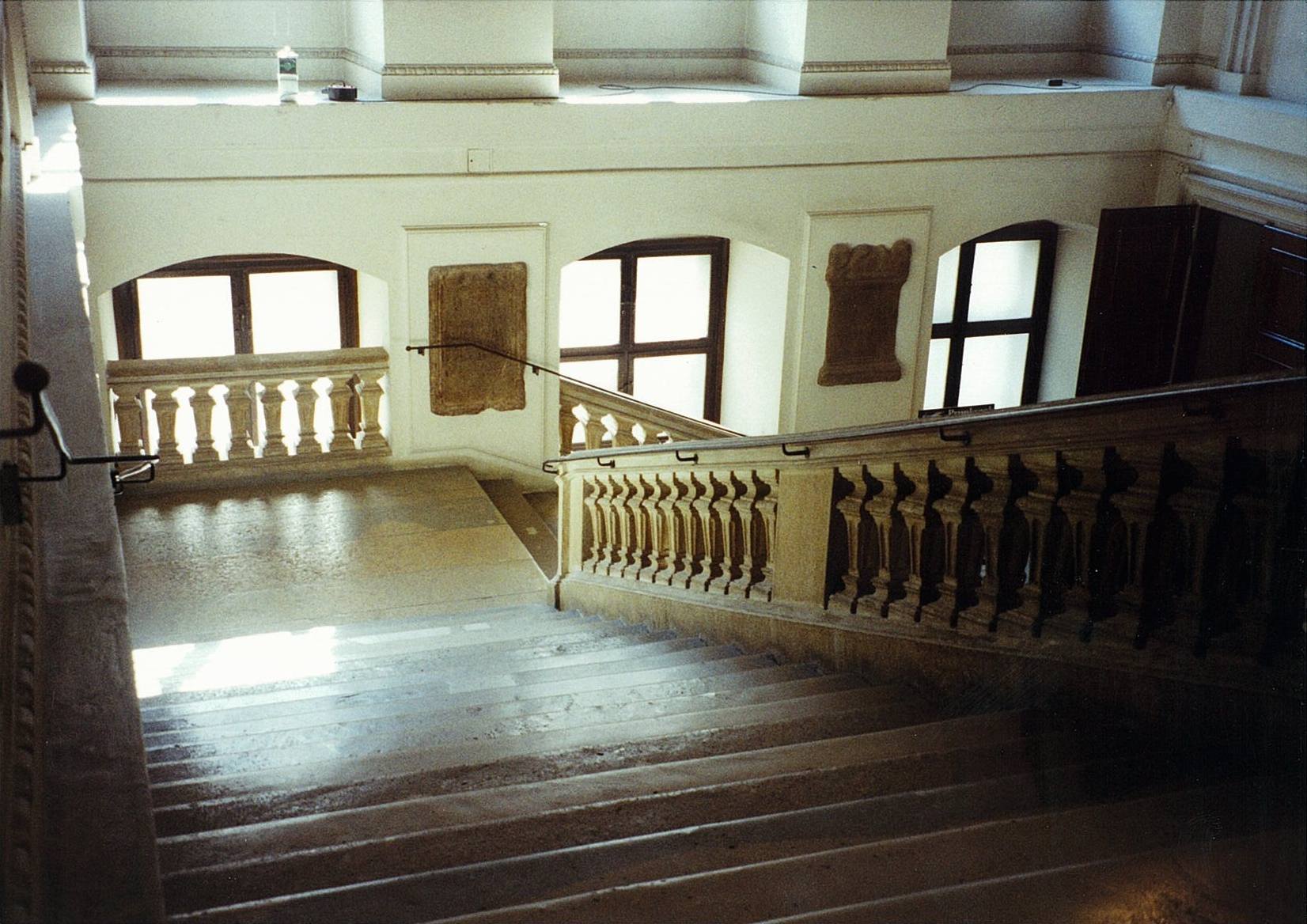 Treppe_zum_Prunksaal1